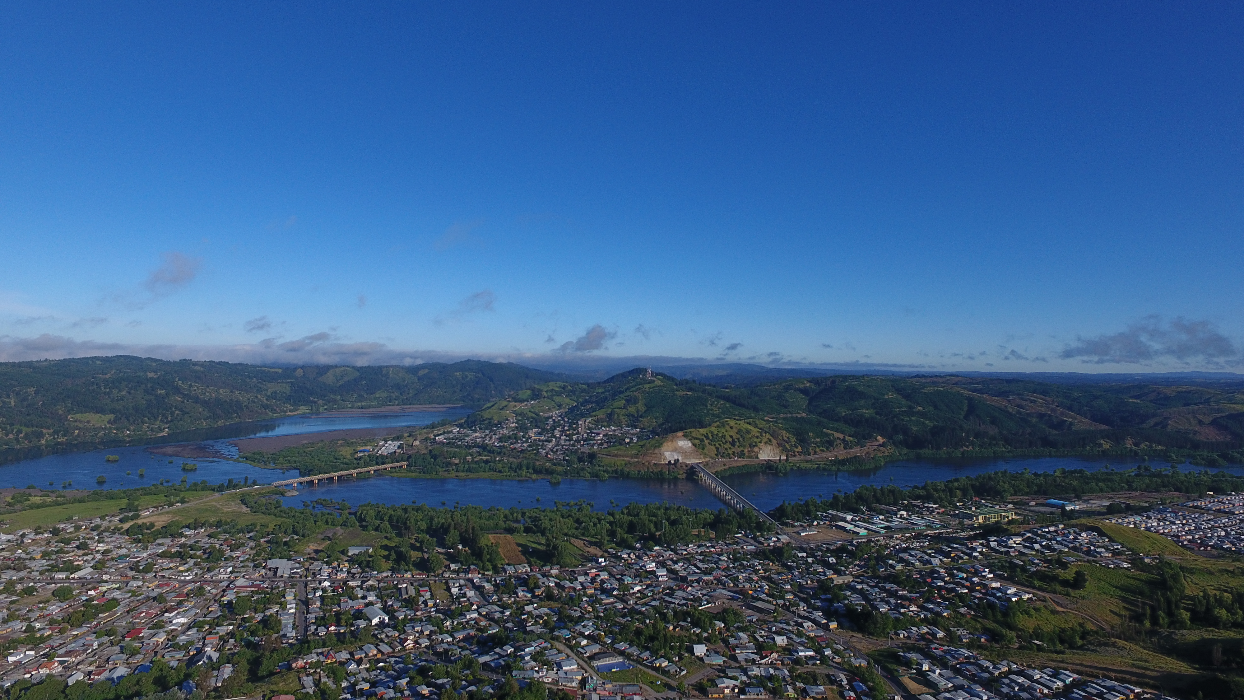 Cruce de los ríos Laja y Biobío desde el aire.